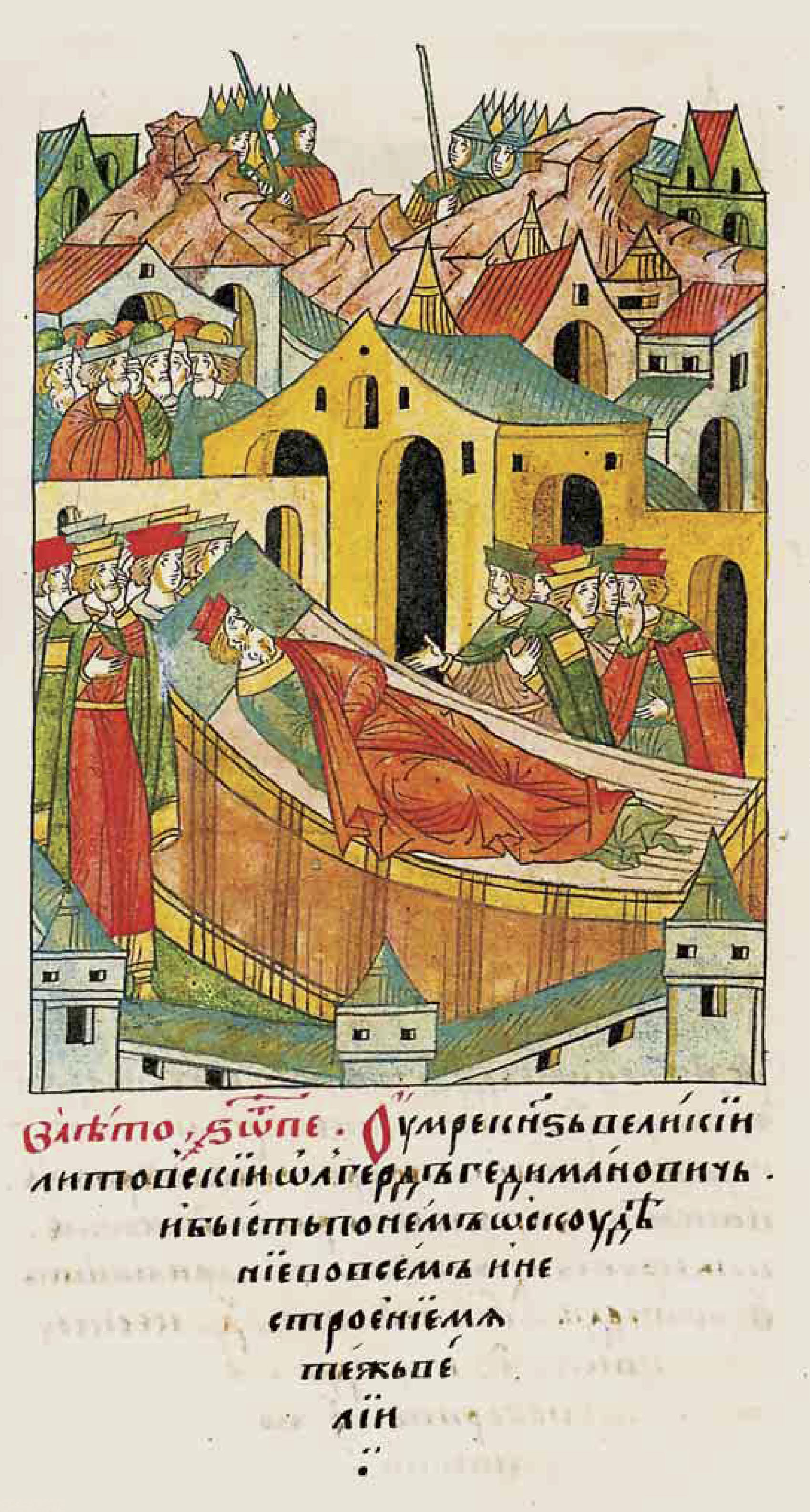 ЛИЦЕВОЙ ЛЕТОПИСНЫЙ СВОД В 6885 году. Умер великий князь Литовский Ольгерд Гедиминович, после чего оскудела его земля, начались в ней нестроения и мятежи.